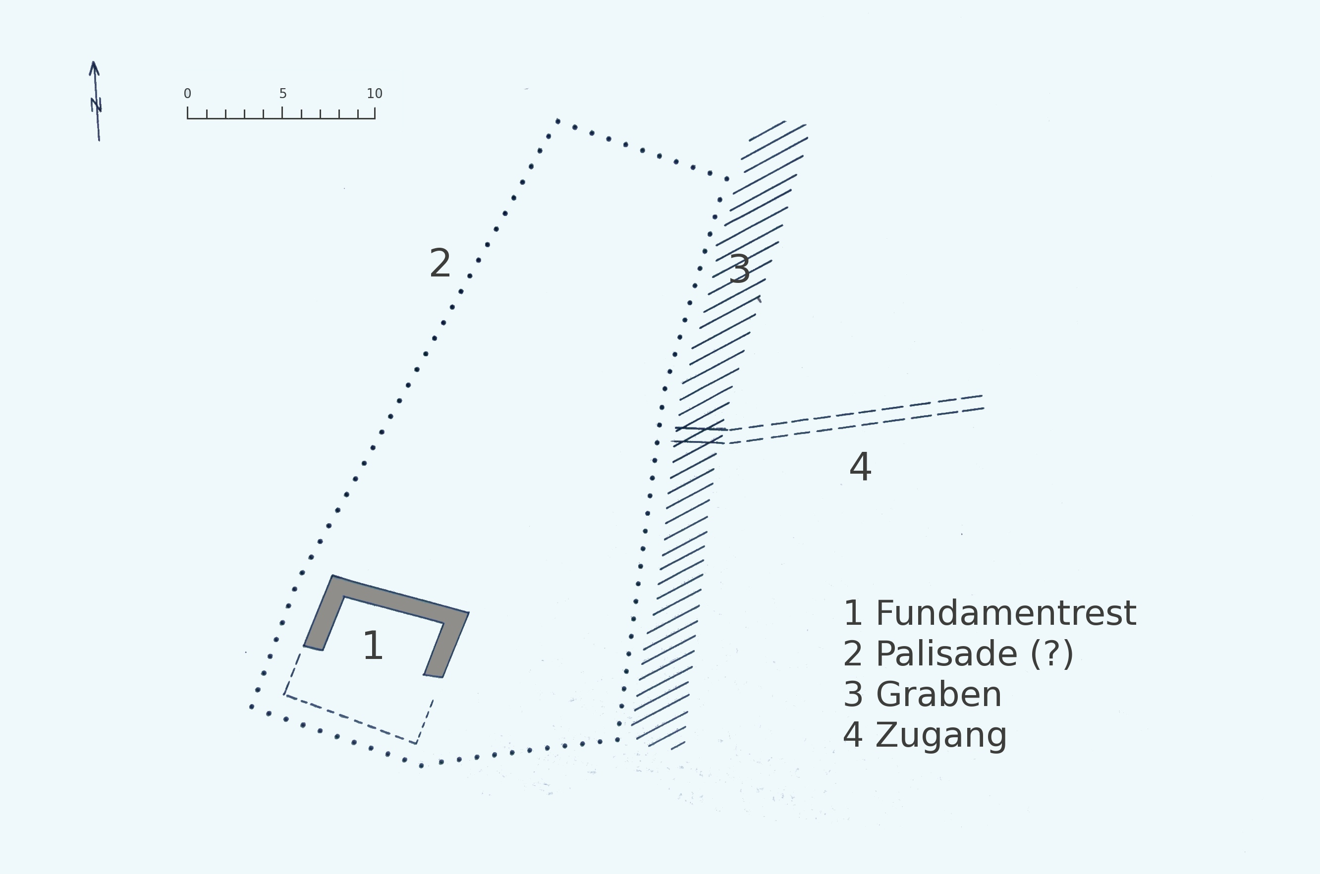 Ruine Wulp Wulp im Frühmittelalter